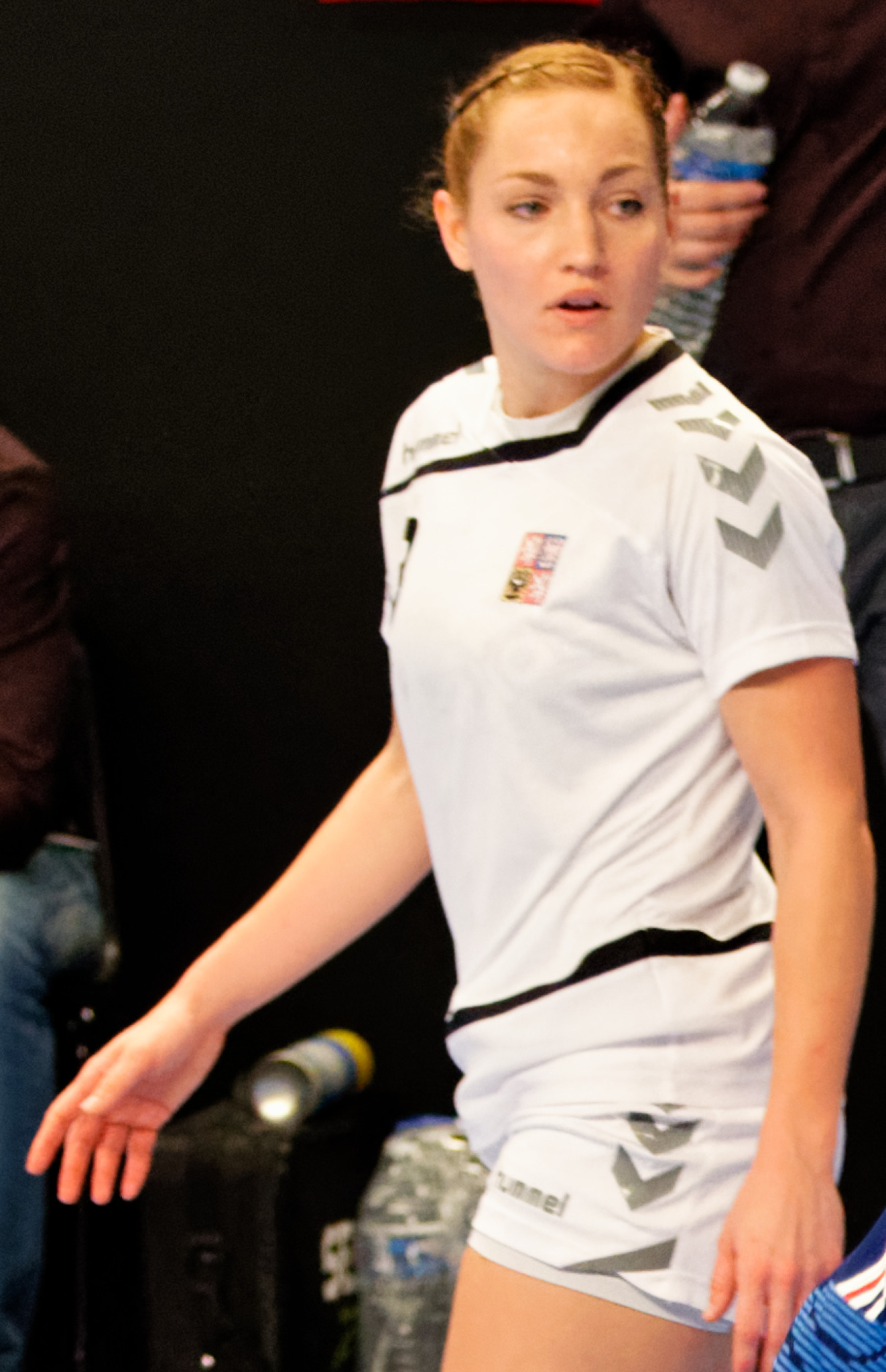 Rencontre du Tournoi de Paris Ile de France féminin (TIPIFF) 2015 entre l'équipe de France et la République Tchèque. A Coubertin, le 29 novembre 2015.